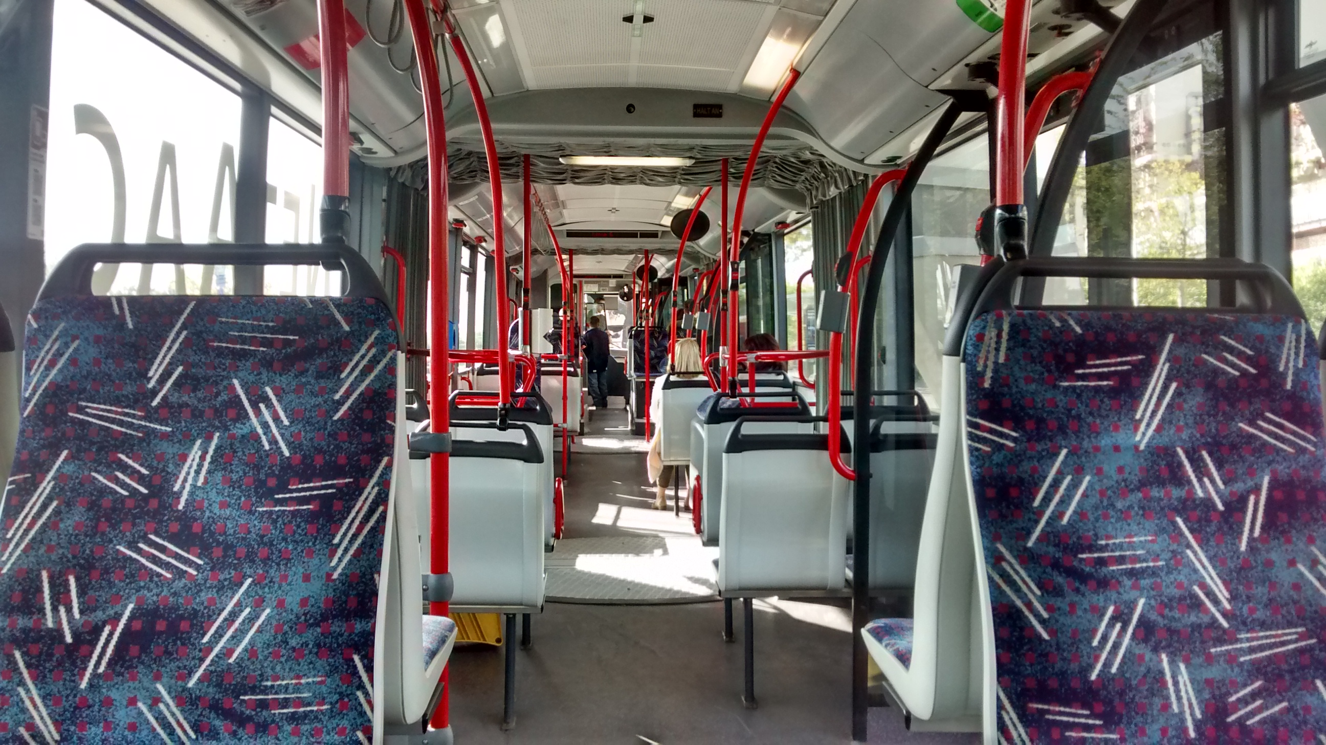 Dieses Bild entstand auf einer Busfahrt mit der AVV-Linie 5 von Aachen-Schanz bis Uniklinik aus dem Van-Hool-Doppelgelenkbus KOM 195.